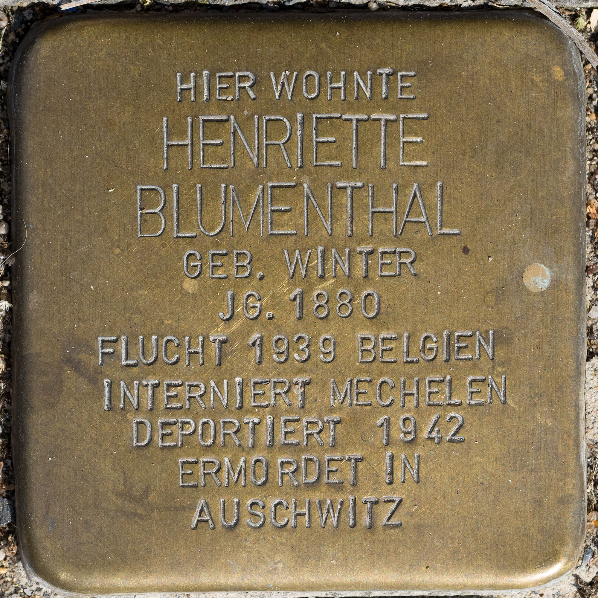 Stolpersteine MG: Blumenthal, Henriette